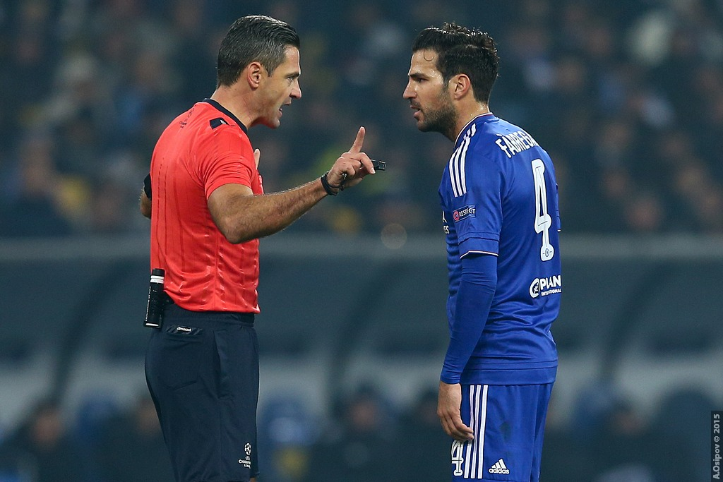 20.10.2015 Kyiv, Olimpiyskiy National Sports Complex Champions League. Group stage. FC Dynamo Kyiv - Chelsea - 0:0 Chelsea (4-2-3-1): Begovic; Zouma, Cahill, JT (c), Azpilicueta; Ramires, Matic; Willian, Fabregas (Oscar 75), Hazard; Diego Costa. Unused subs Blackman, Baba, Mikel, Traore, Kenedy, Falcao. Booked Zouma 67 Dynamo Kiev (4-1-4-1): Shovkovskiy; Danilo Silva, Khacheridi, Dragovic, Vida; Rybalka; Yarmolenko, Sydorchuk, Buyalskiy (Garmesh 83), Gonzalez; Kravets (Junior Moraes 78). Unused subs Rybka, Antunes, Petrovic, Gusev, Miguel Veloso. Booked Buyalskiy 65 20.10.2015 г.Киев. НСК "Олимпийский". Лига Чемпионов. Групповой этап Динамо — Челси 0:0 Динамо: Шовковский — Данило Силва, Драгович, Хачериди, Вида — Рыбалка, Буяльский (Гармаш, 83) — Ярмоленко, Сидорчук, Гонсалес — Кравец (Мораес, 78) Челси: Бегович — Аспиликуэта, Терри, Кэхилл, Зума — Матич, Рамирес — Виллиан, Фабрегас (Оскар, 75), Азар — Д. Коста Предупреждения: Буяльский — Зума